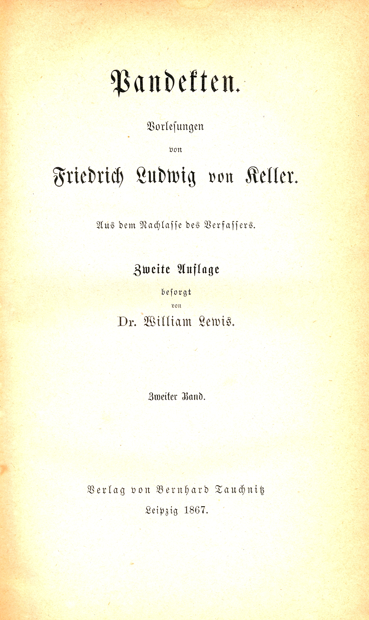 Friedrich Ludwig Keller: Pandekten, Leipzig 1867